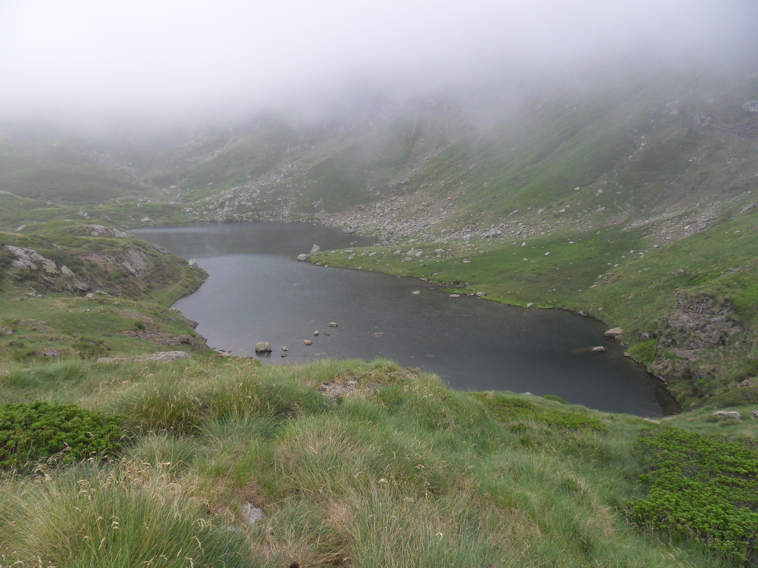 L'étang bleu de la vallée de Courbière en Ariège